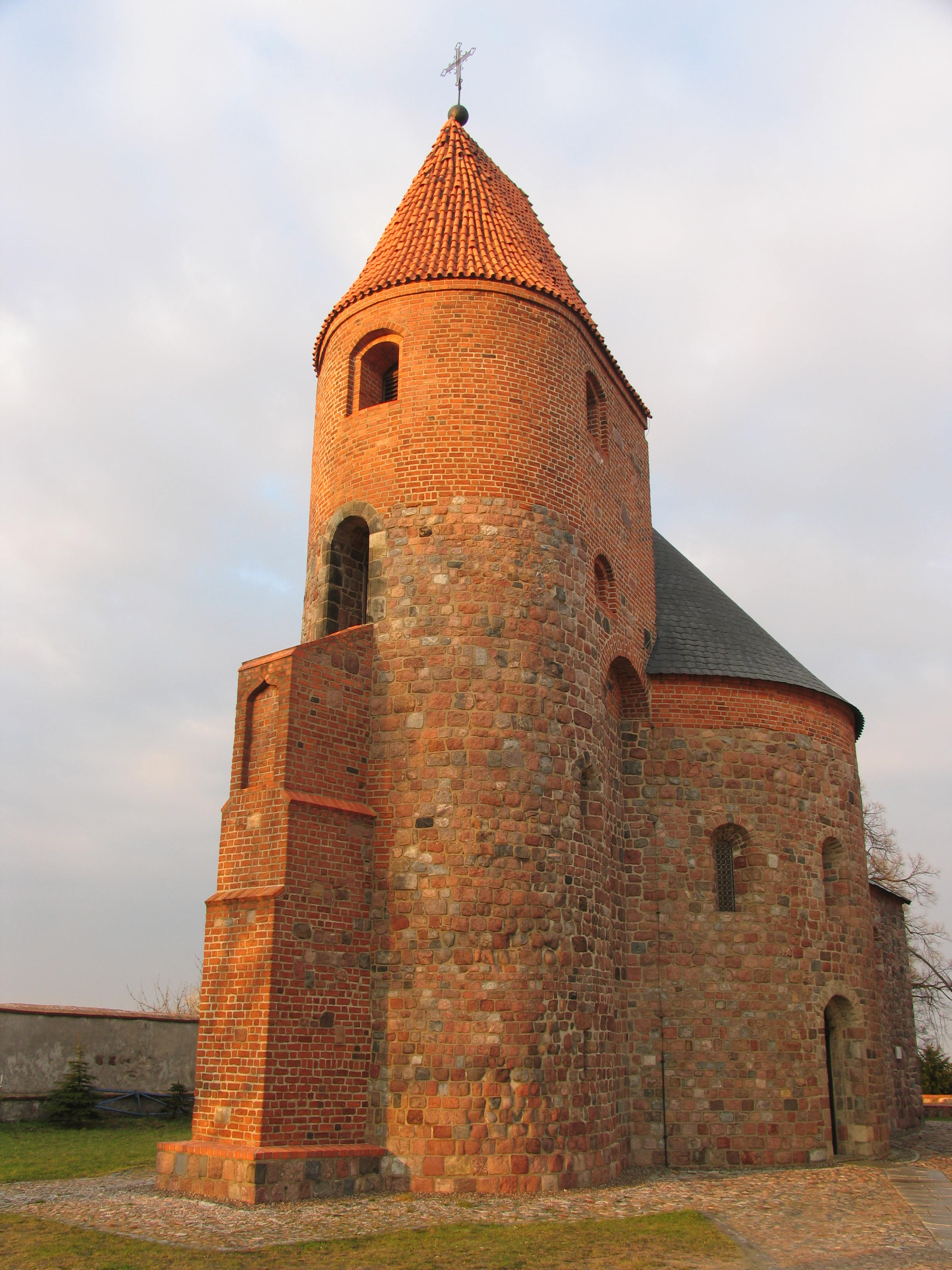 Strzelno, kościół p.w. św. Prokopa, 2 poł. XII, XX